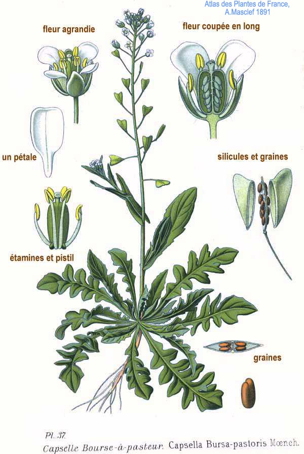 Capsella bursa-pastoris Moench.